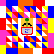 Mallabiako bandera, Bizkaian